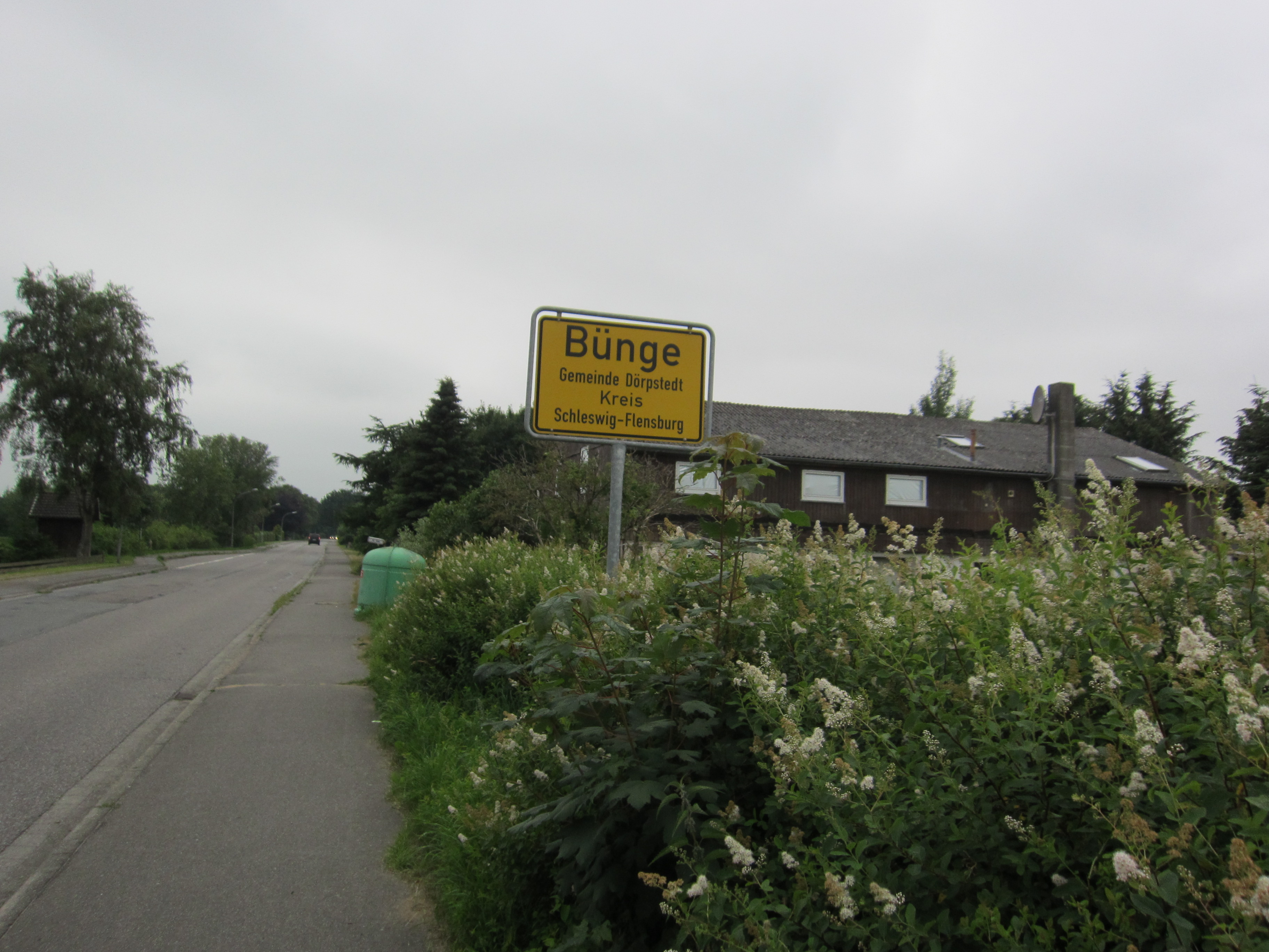 Ortseingangsschild Bünge in Dörpstedt